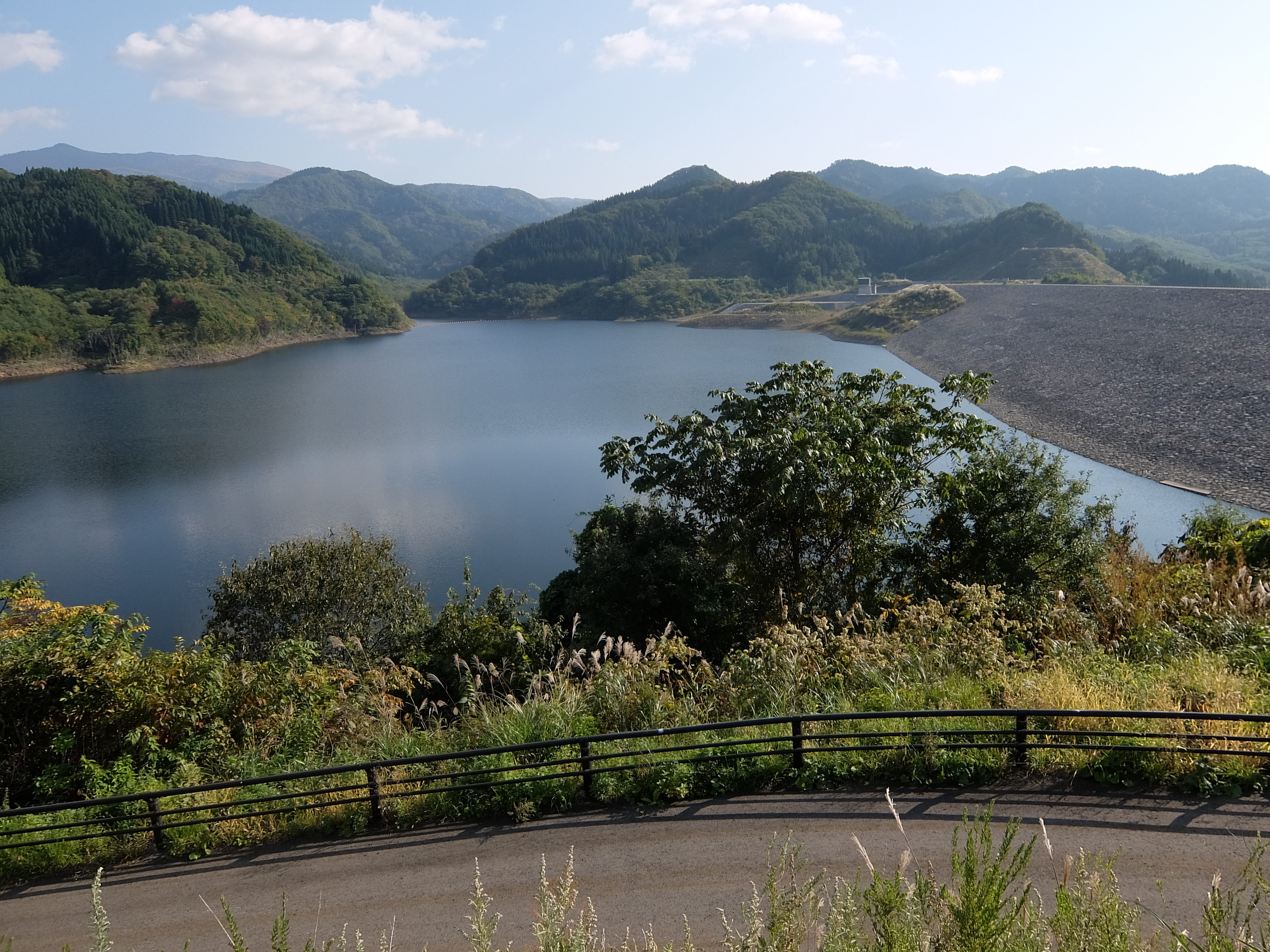 森吉山ダム（ダム広報館より臨む）